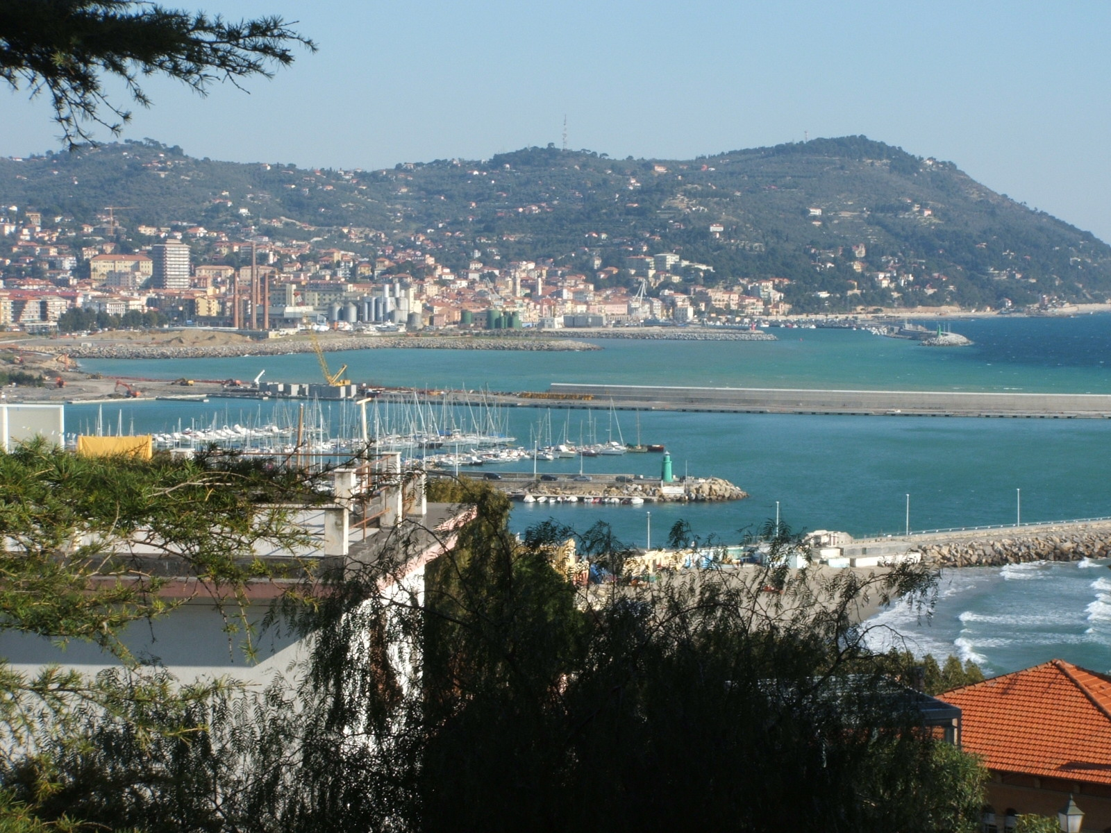 Immagine da Imperia Panorama su Imperia (Oneglia) dal Parasio